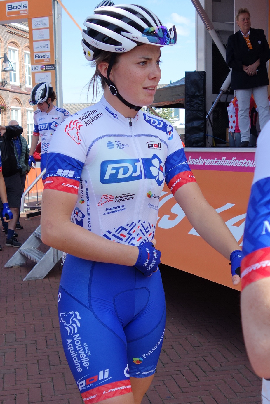 Maëlle Grossetête (FDJ) bij de start van de eerste etappe van Stramproy naar Weert in de Boels Ladies Tour 2019